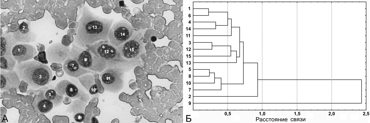 Пример применения кластерного анализа